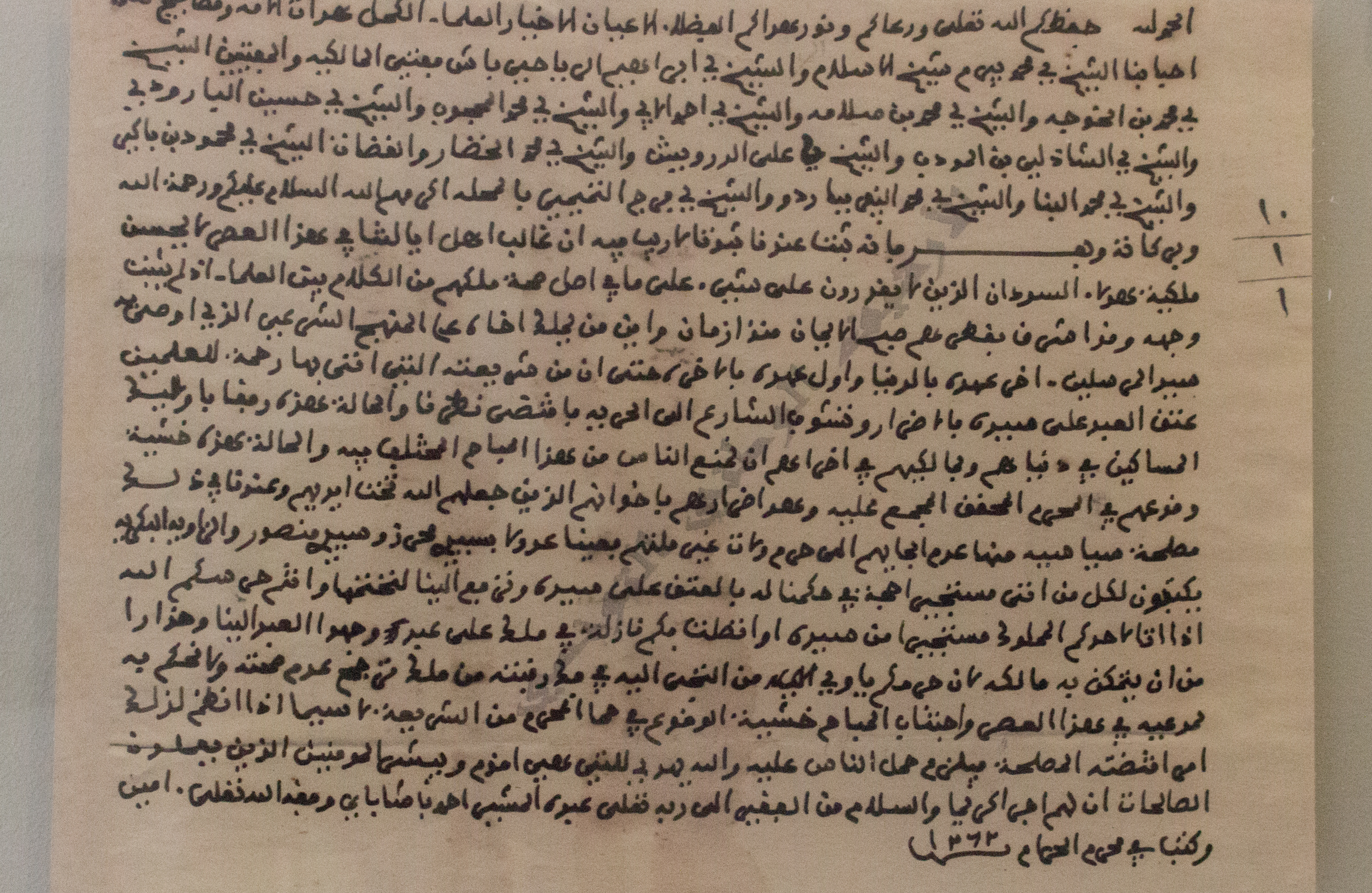 قانون إلغاء الرق 23 جانفي 1846